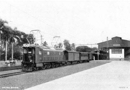 Eine Lokomotive der ESS-Reihe 3000 im Bahnhof Pasar Senen in Jakarta. Werksfoto BBC